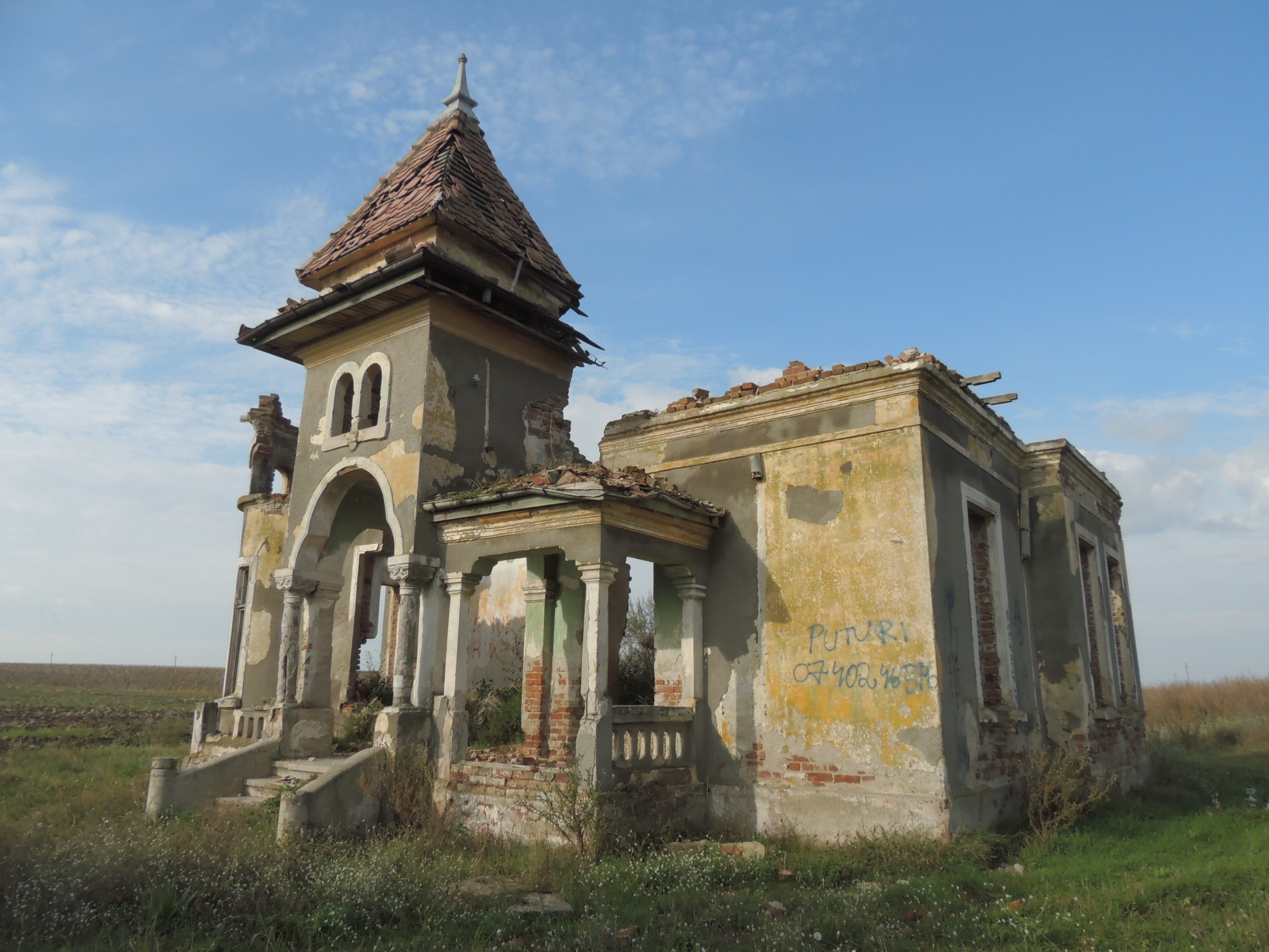 Ruinele unui conac din Deveselu (posibil numit Hanul Haiducilor)